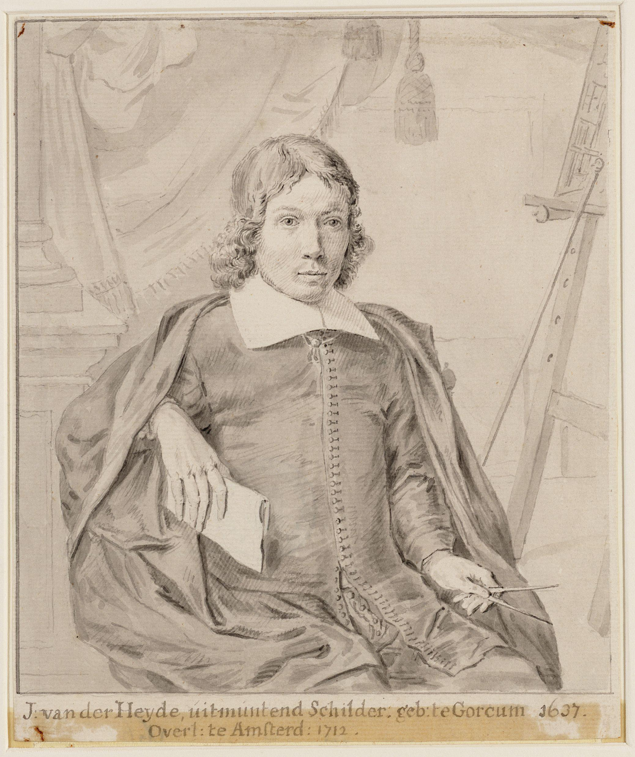 Portrait of Jan van der Heyden